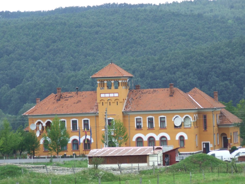 Sarmizegetuza, Hunedoara County, Romania